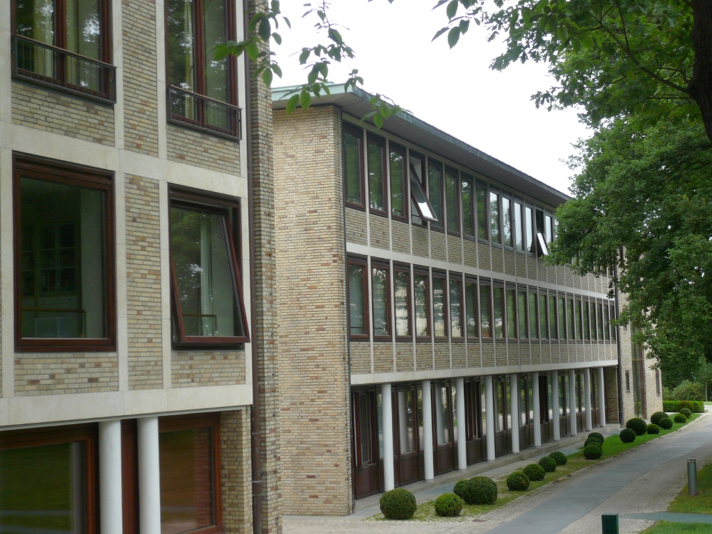 Haus K. in O. -Villa Reemtsma - in Hamburg Othmarschen: Verwaltungsbauten